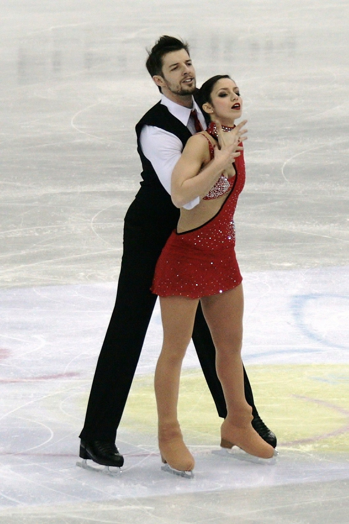 Стефания Бертон и Ондржей Готарек (Италия) на чемпионате мира по фигурному катанию 2012